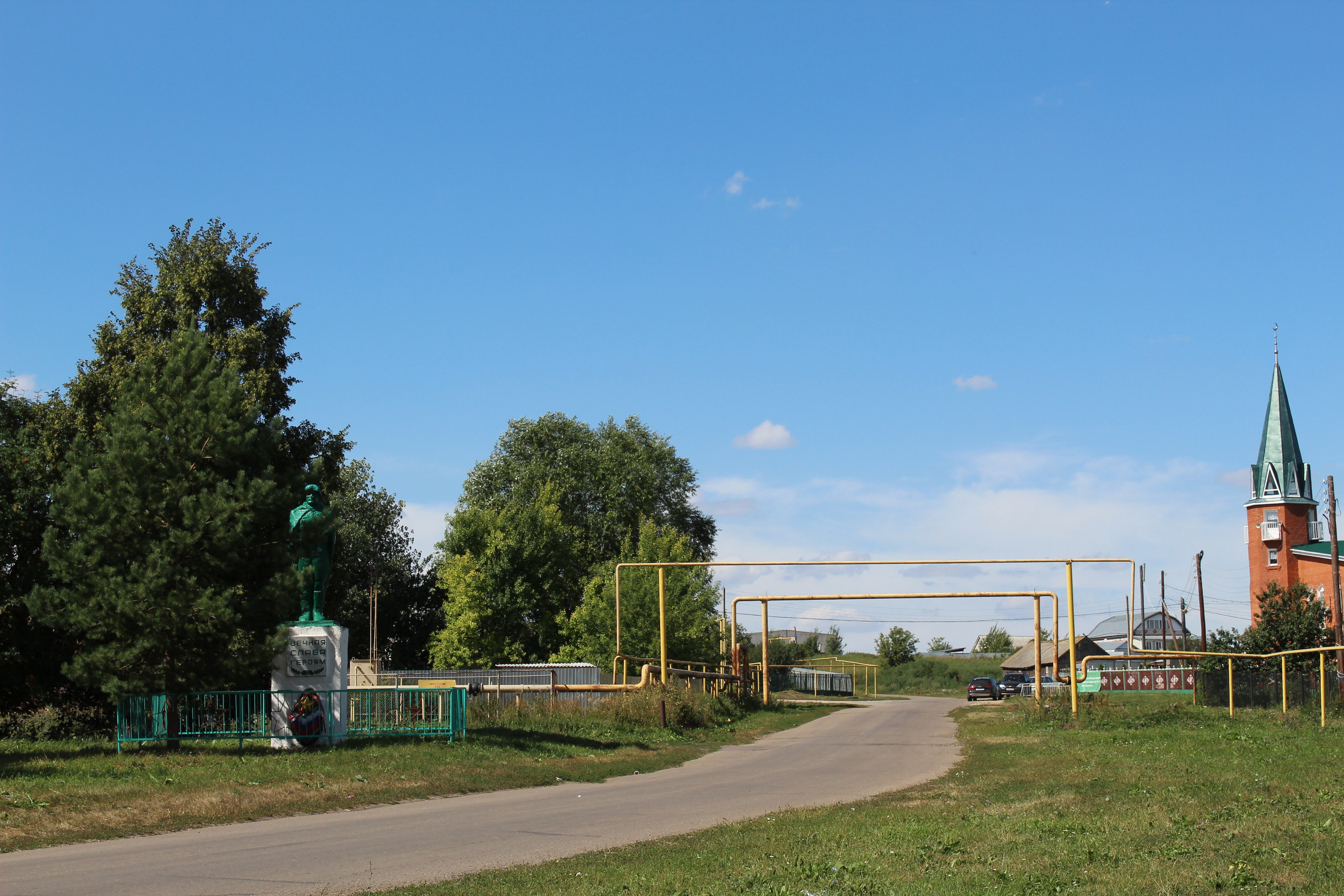 Ключищи вов (2)